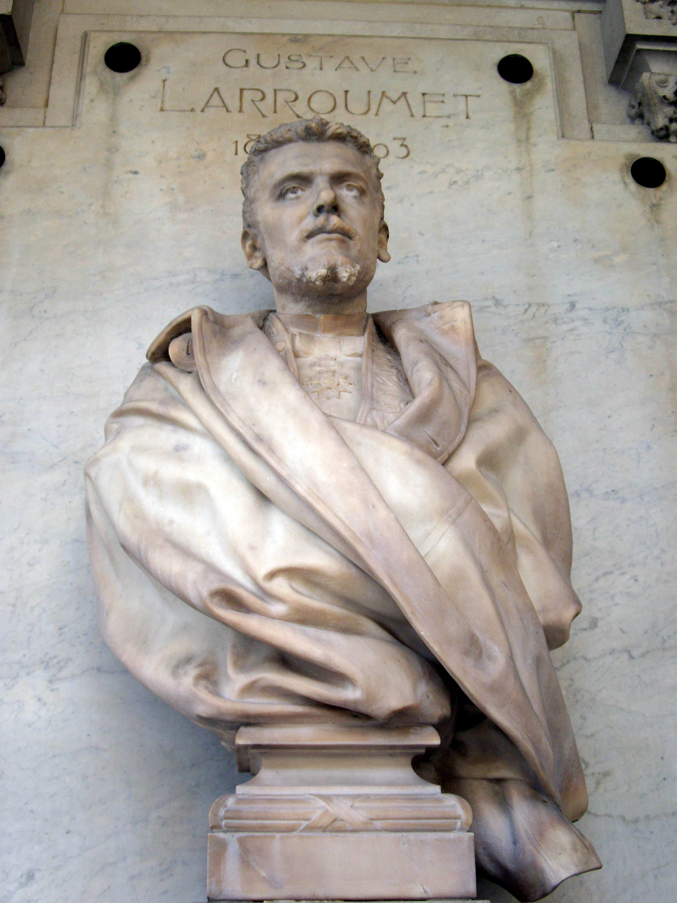 Gustave Larroumet (1852-1903) par Paul Roussel (1867-1928). Buste en marbre blanc ornant la façade droite de la Comédie-Française dans la galerie du Théâtre-Français au Palais-Royal, Paris 1er.